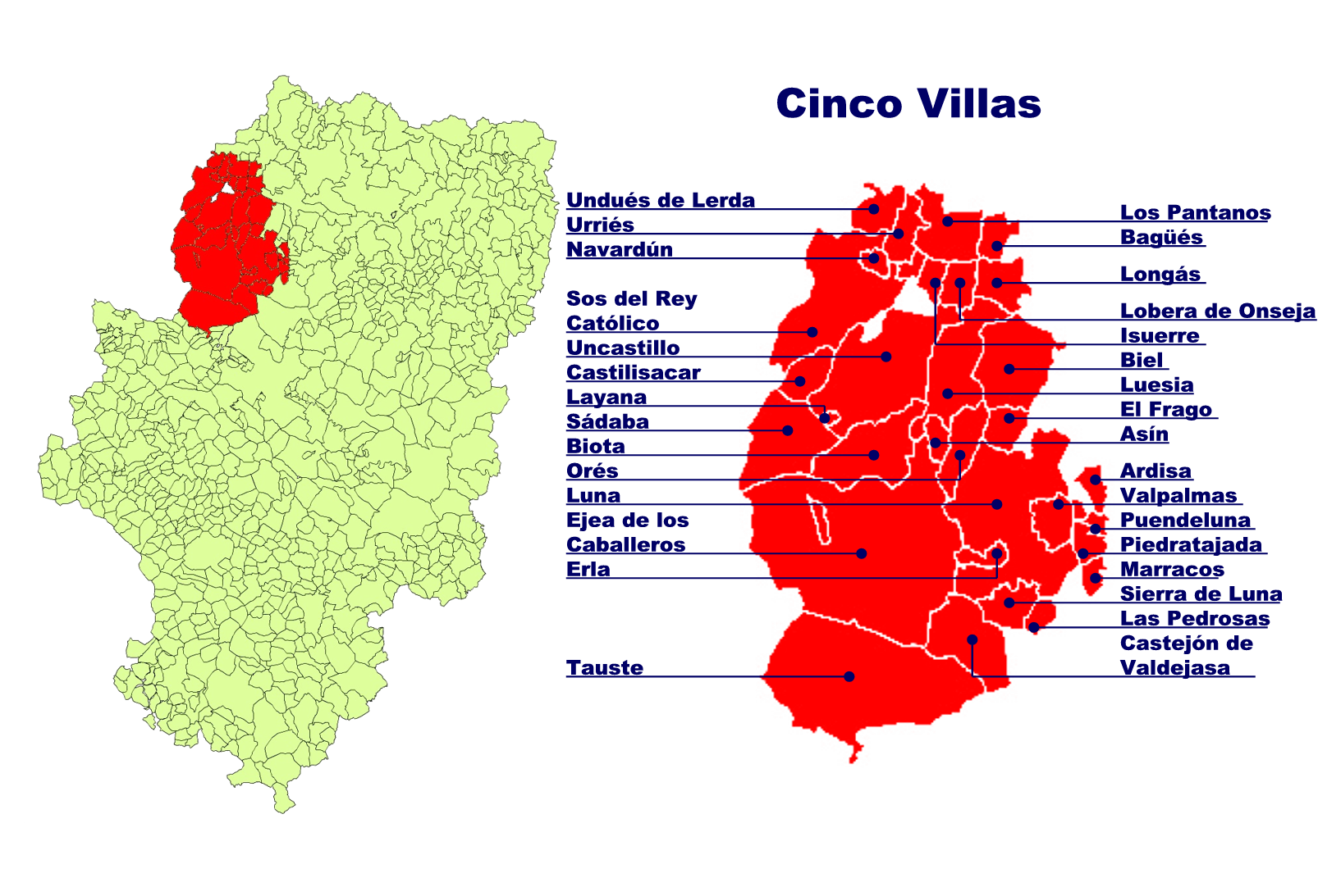 Comarca de las Cinco Villas Creado el 14.11.2005 por Ecelan en base a Image:Aragon municipalities.png